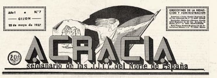 Le 26 décembre 1936, à Gijón (Asturies, Espagne), sortie du premier numéro de l'hebdomadaire "Acracia" Organe Régional des Jeunesses libertaires des Asturies, du Leon et Palencia.